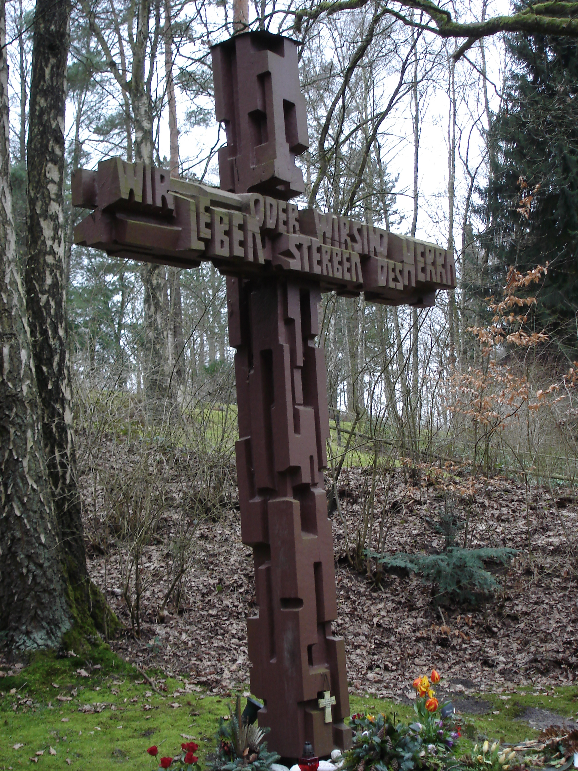 Ruhestätte der Diakonissen des Diakonissenhauses Detmold, Waldfriedhof am Kupferberg, Detmold, NRW, Deutschlnad